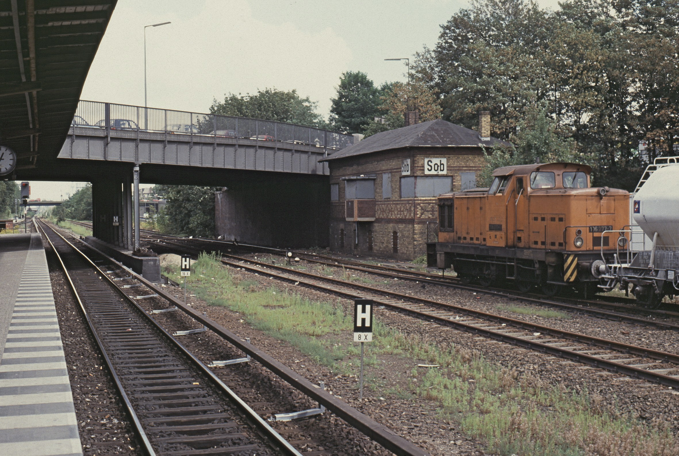 Berlin Feuerbachbrücke mit Stellwerk Sob des Güterbahnhofs Steglitz